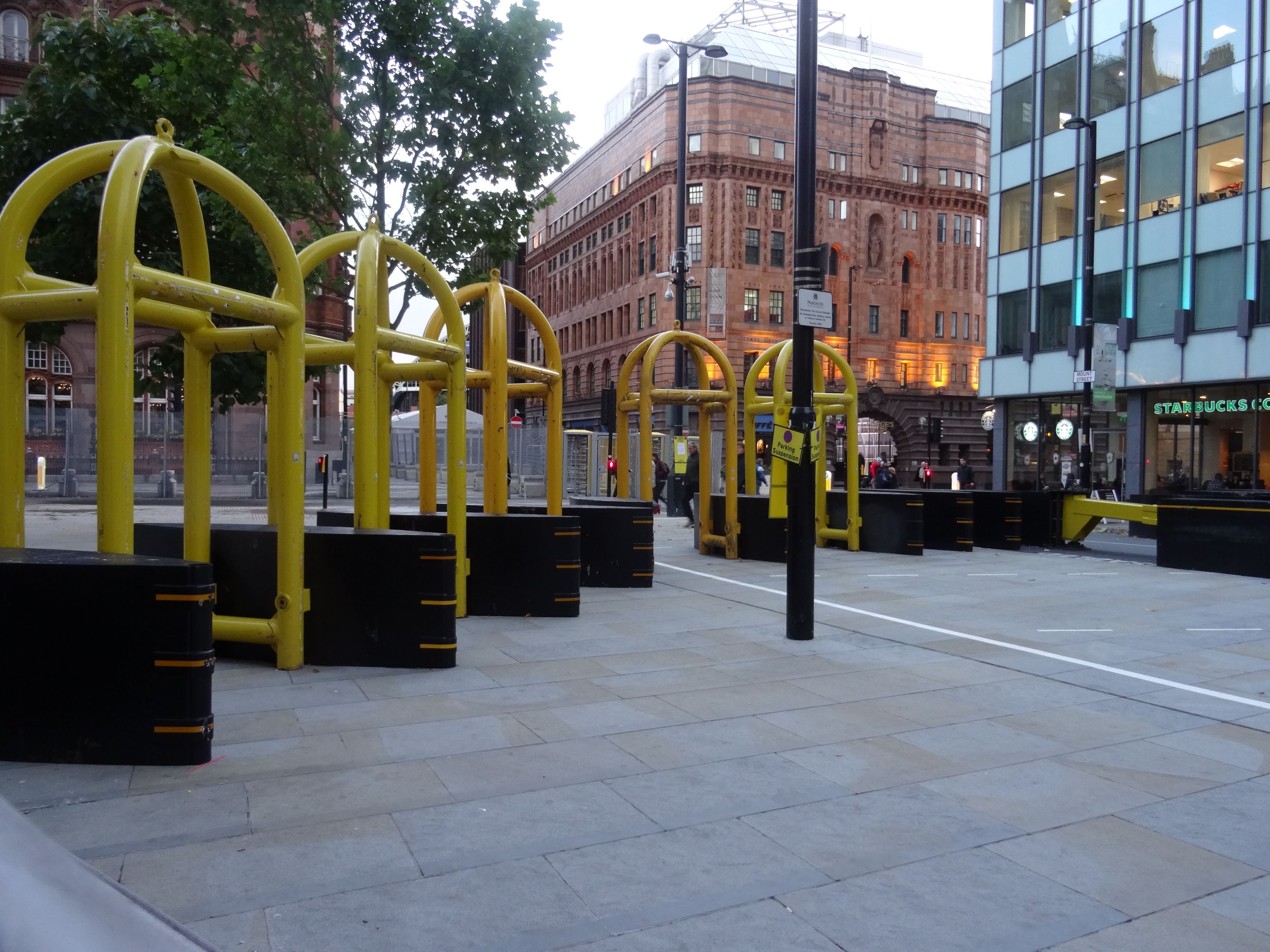 L'hôtel Midland de Manchester protégé durant l'université du Parti conservateur en octobre 2015.